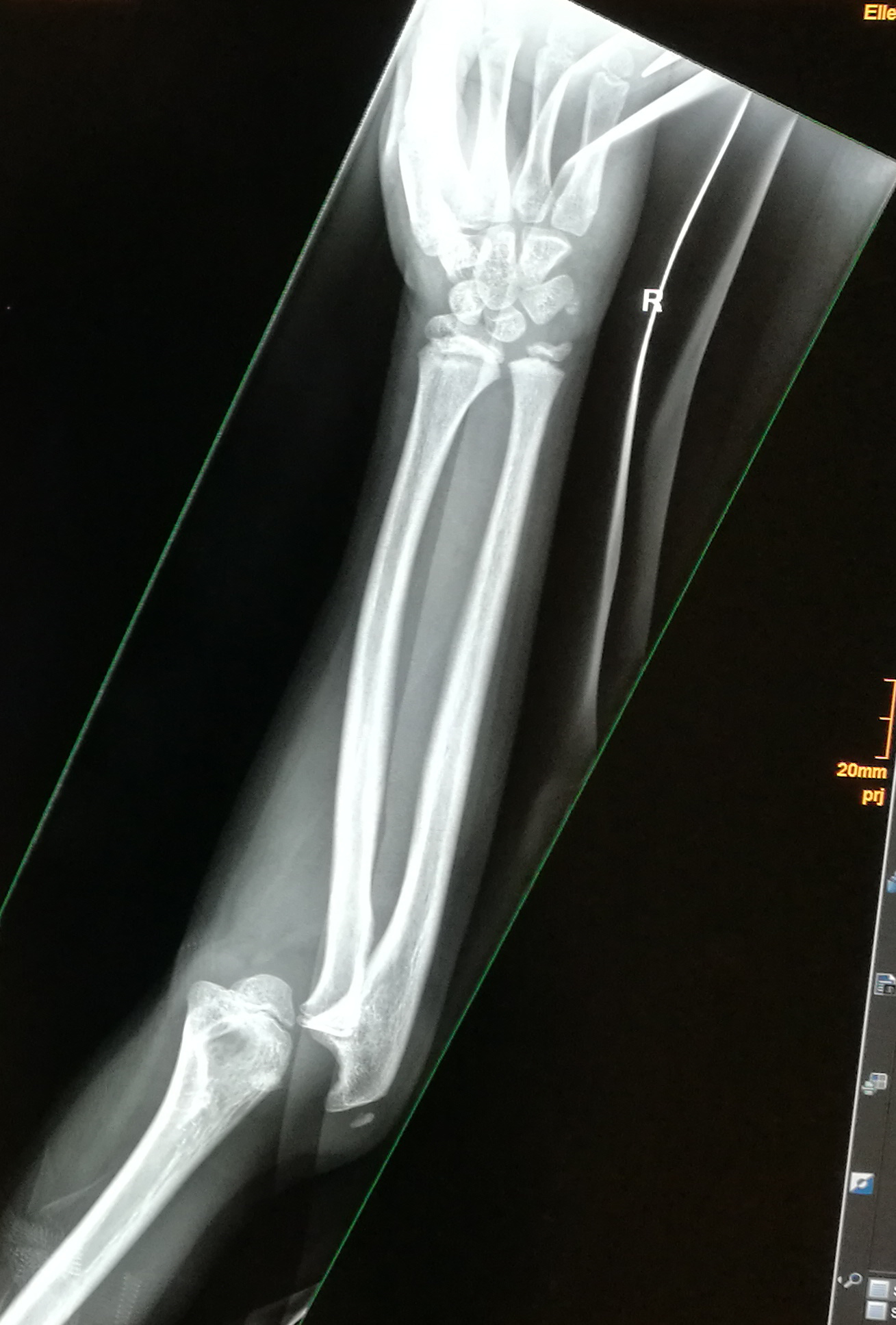 Röntgenaufnahme Luxation Ellbogen rechts, 8jähriges Kind